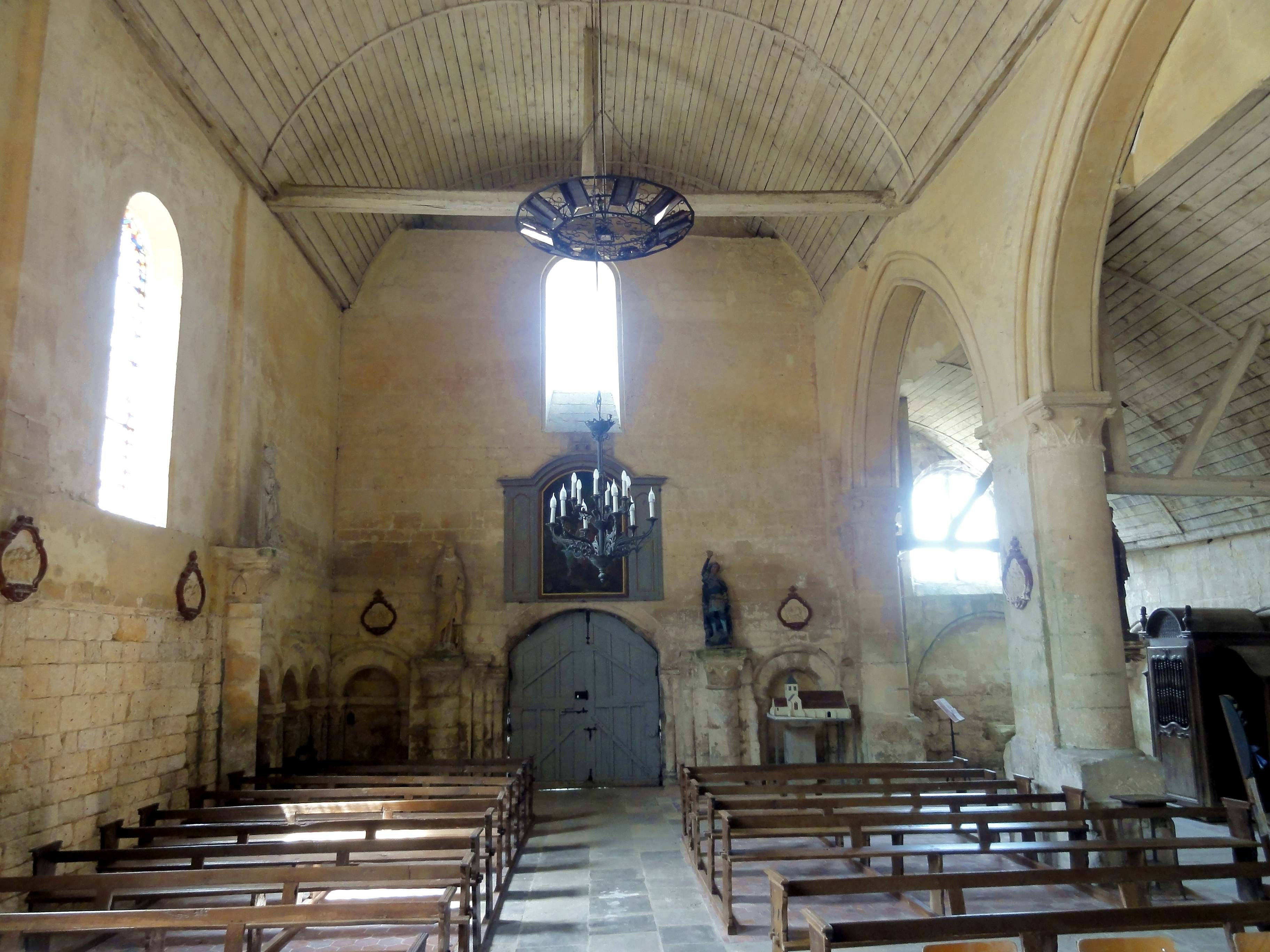 Intérieur de l'église (voir titre).